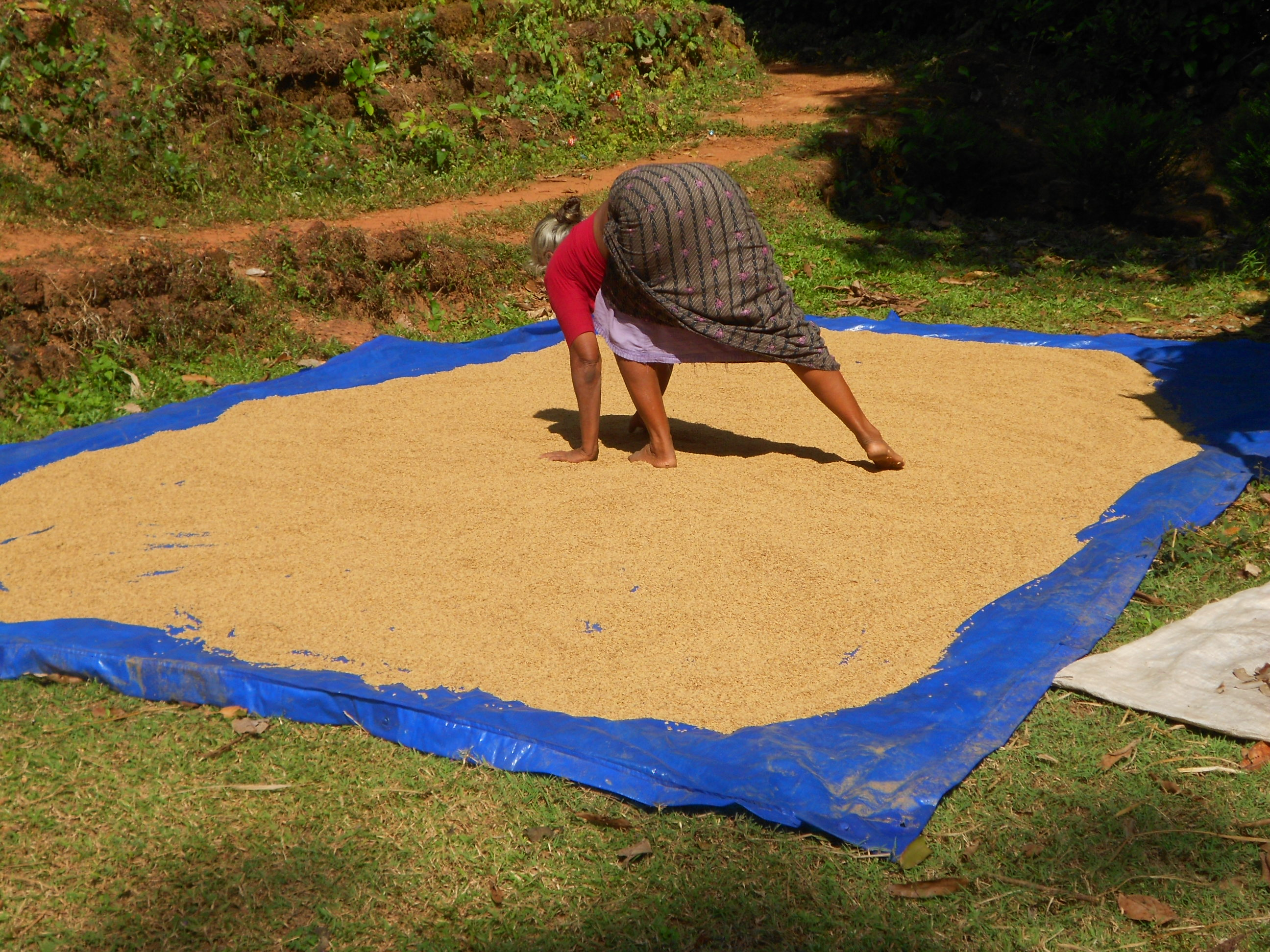 നെല്ലുണക്കാനായി വെയിലത്ത് നിരത്തുന്ന ഒരു സ്ത്രീ.